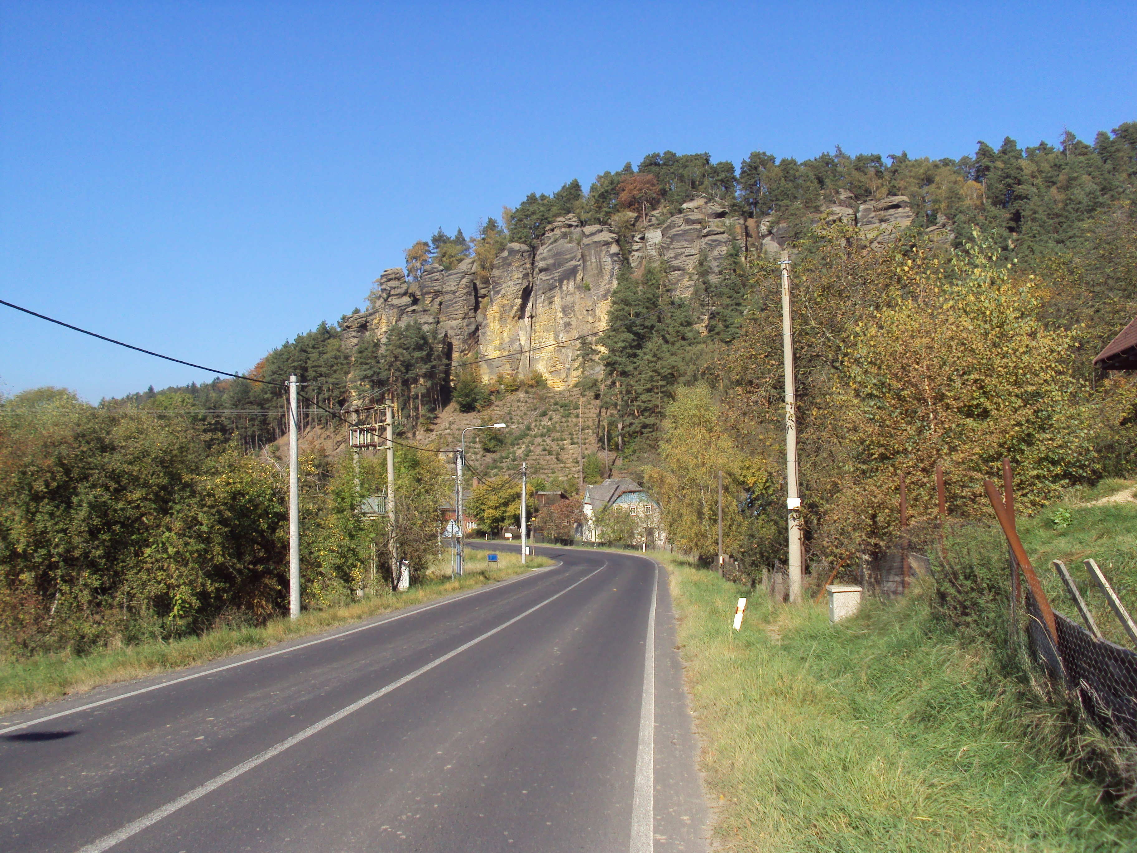 Skály nad Starým Svojkovem, z silnice do Zákup